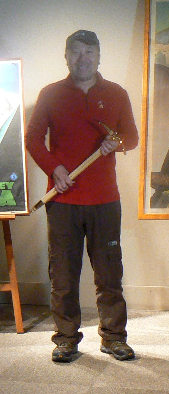 Wang e la sua équipe, allenati dal celebre Thomas Bubendorfen, hanno fatto tappa a Courmayeur per una formazione sul campo, ovviamente sul Monte Bianco. Il 1° febbraio incontrano le autorità locali e regionali nella sede della Società delle Guide Alpine di Courmayeur (foto nel museo Alpino Duca degli Abruzzi). Il capitano Yongfeng Wang (alto ufficiale dell'esercito cinese e presidente della CMA, China Mountaneering Association) riceve il Piolet d'Or Grivel. "Personalità dell'alpinismo cinese in Italia", Courmayeur (AO), dal 31 gennaio al 6 febbraio 2013. [1]